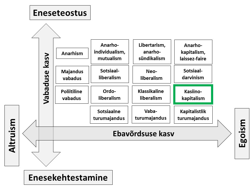 Kasinokapitalism sotsiaalse korra mudelis